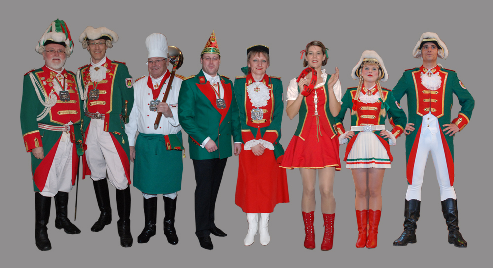 Uniformen des Godesberger Stadtsoldatenkorps: Offizier im Generalstab, Artillerist, Regimentskoch, Mitglied des Herrensenats in der Litevka, Damensenat, Mädchentanzgruppe, Mariechen, Tanzoffizier